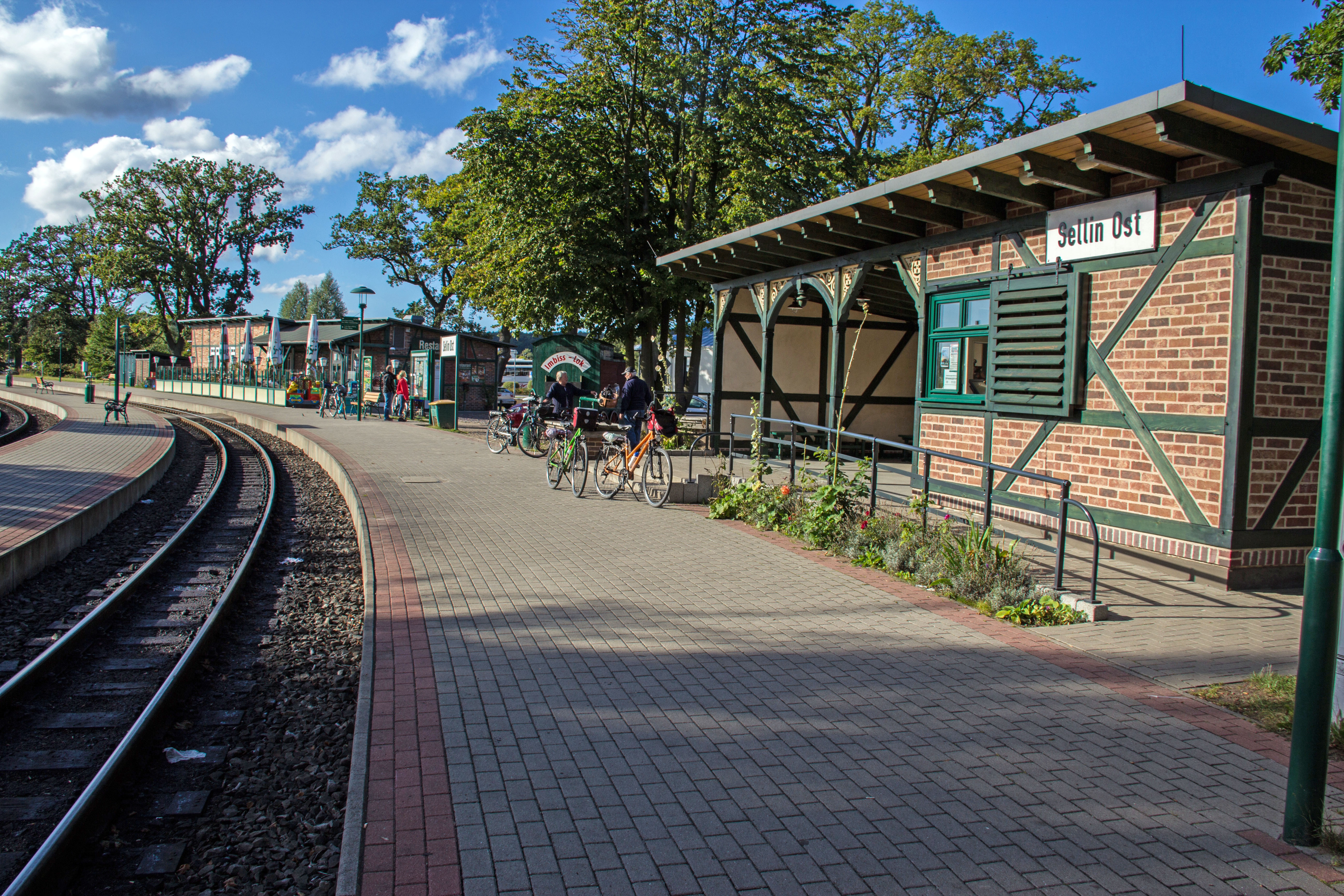 Sellin, Ostbahnhof